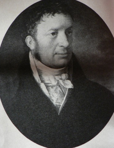 Godsägaren Jacob Dahl från Göteborg